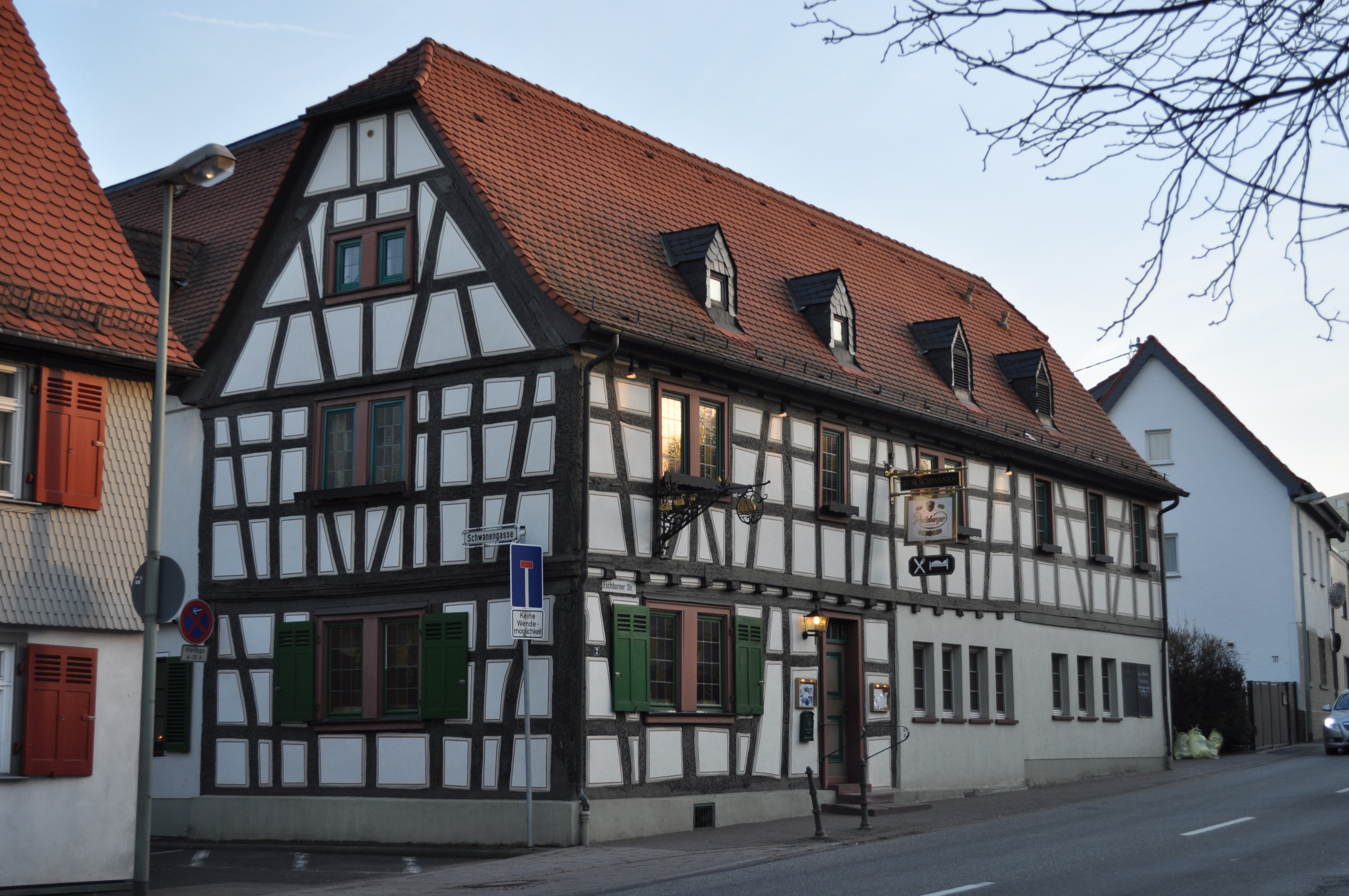 Gasthaus "Zum Schwanen" in Steinbach (Taunus)